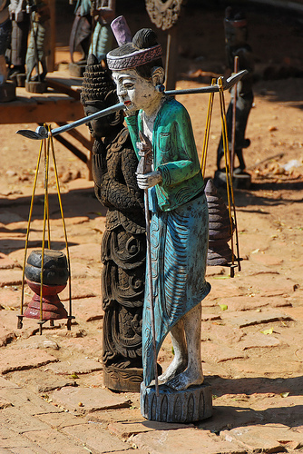 Statuette d'un porteur d'eau